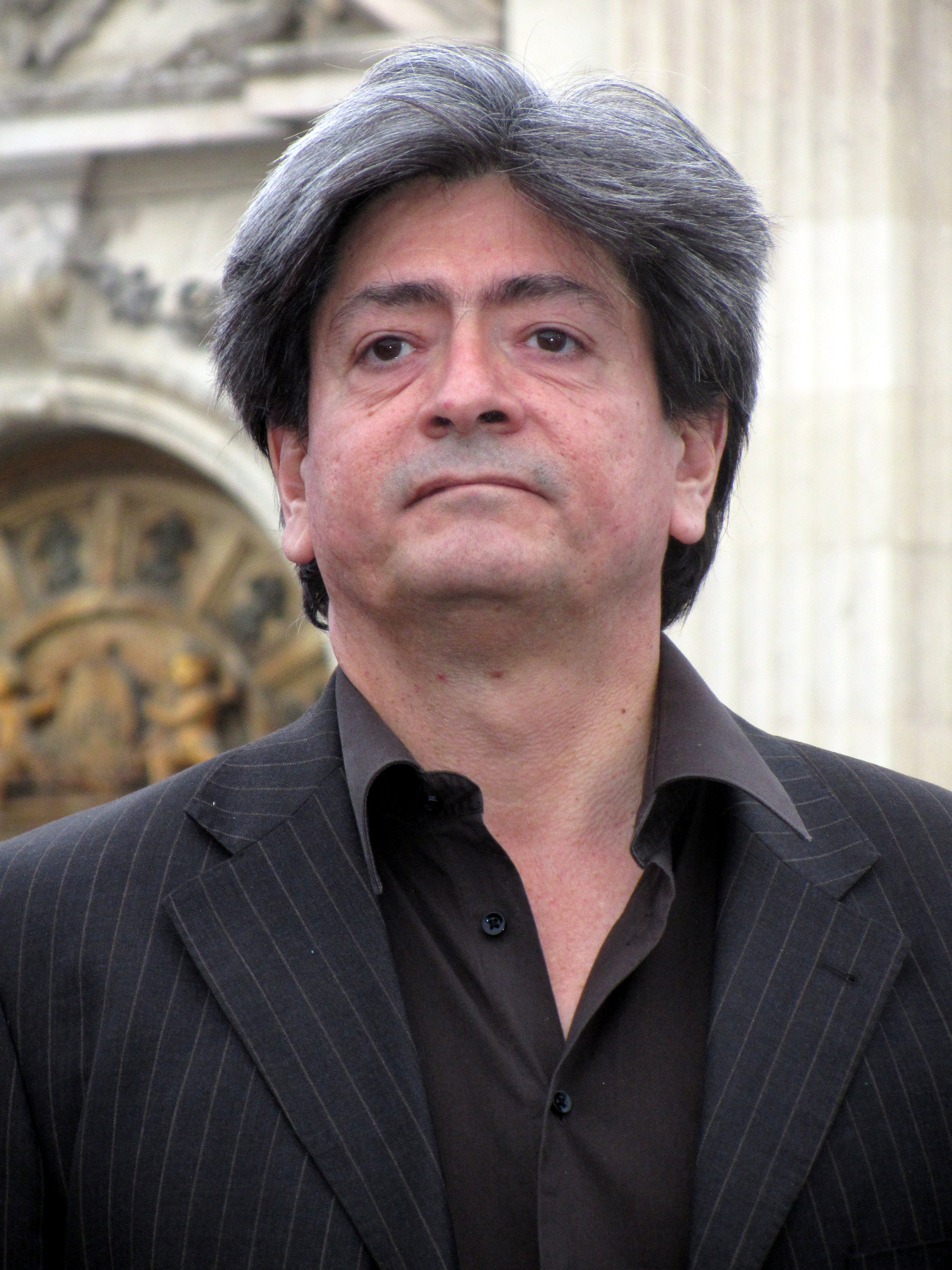 El escritor chileno Mauricio Electorat en la Fiesta del Libro de la Plaza de Armas de Santiago, 23 de abril de 2013